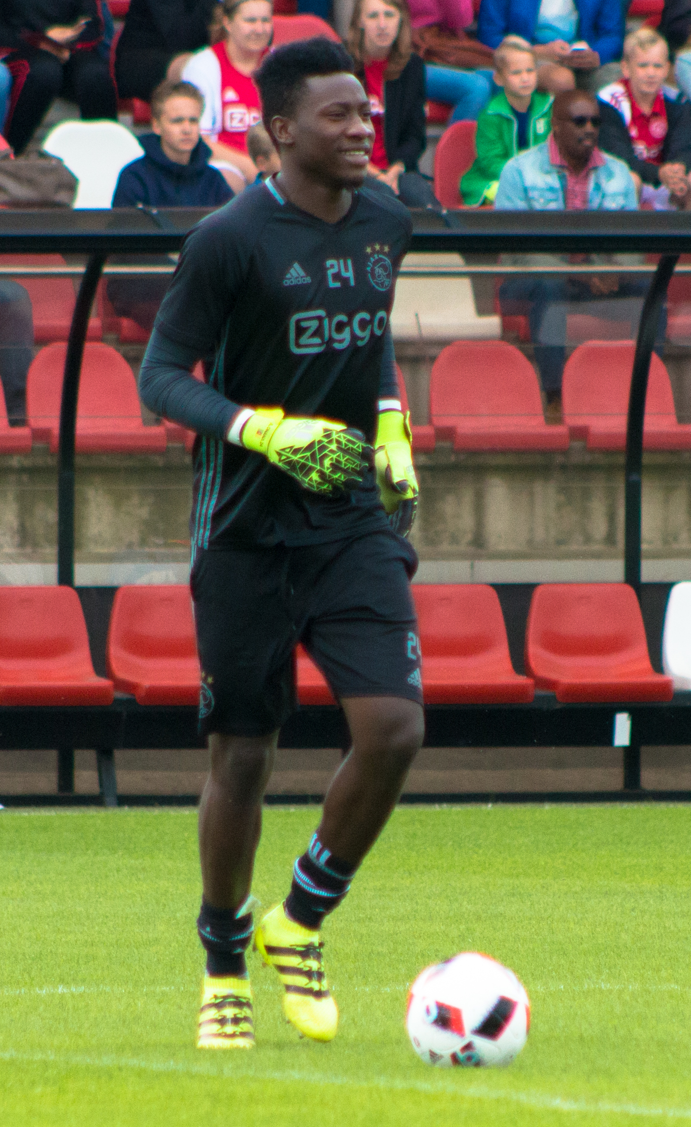 Ajax Open Training